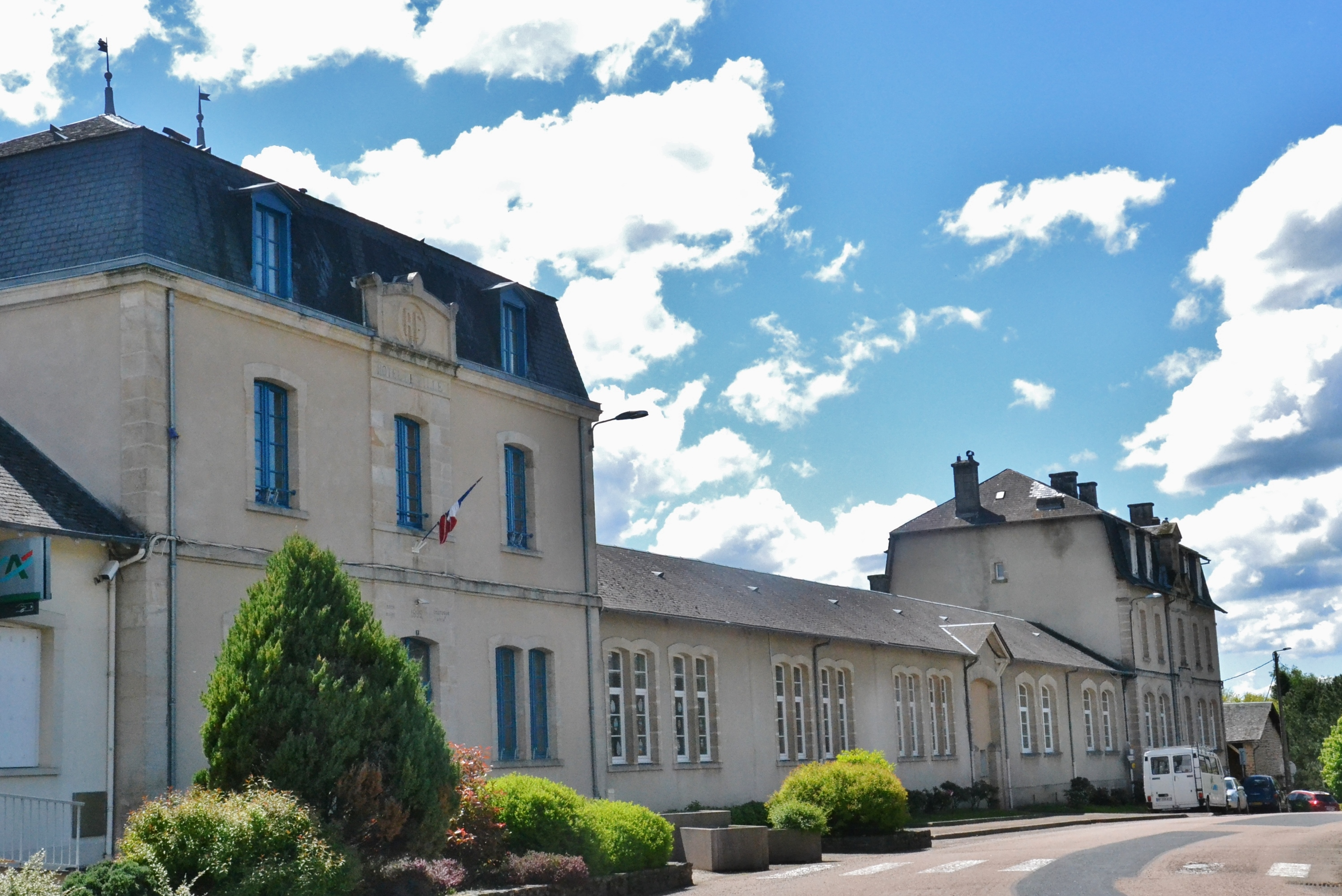 Mairie et école de Chamboulive (Corrèze, France)